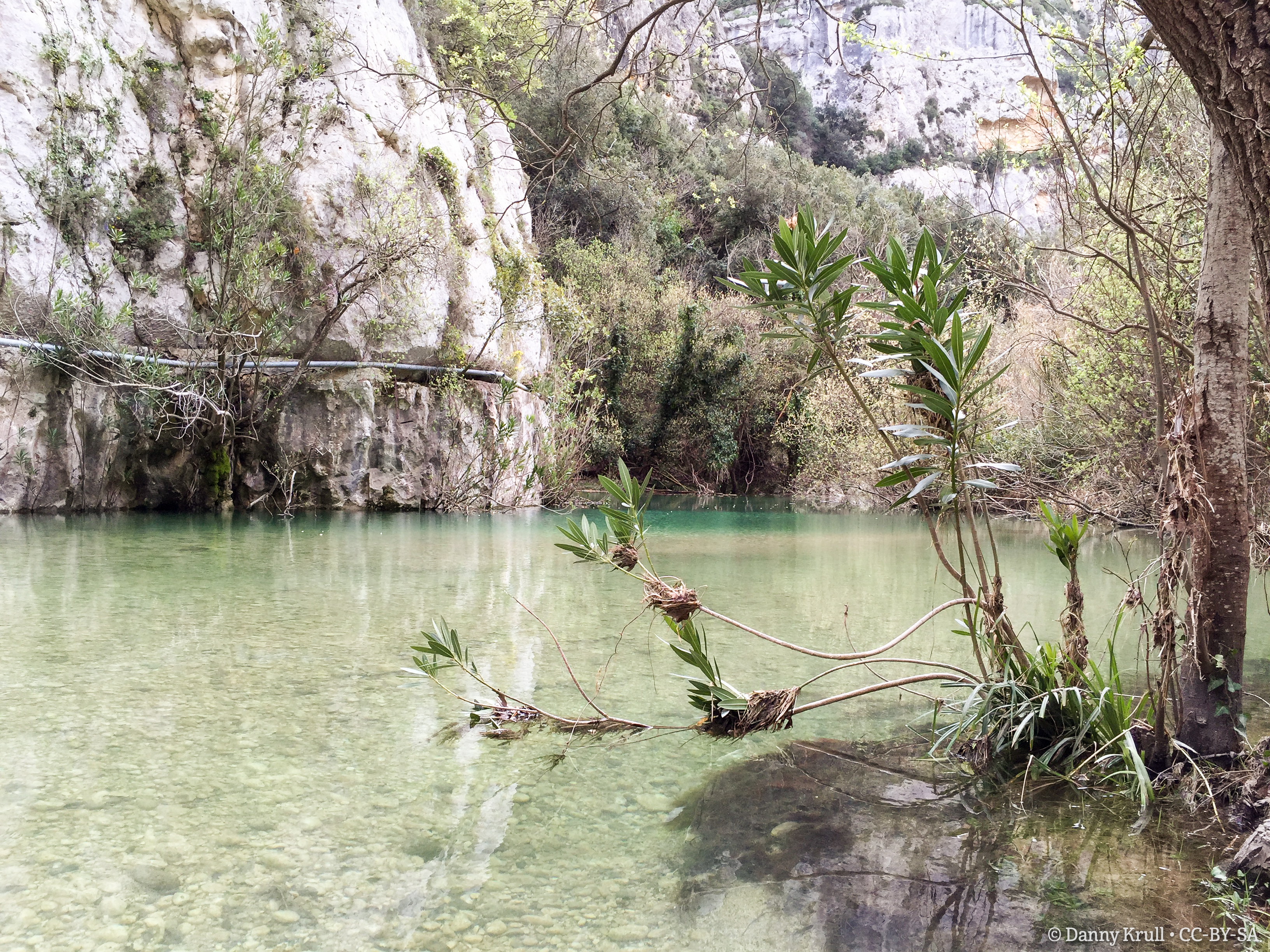 Valle dell'Anapo a Sortino